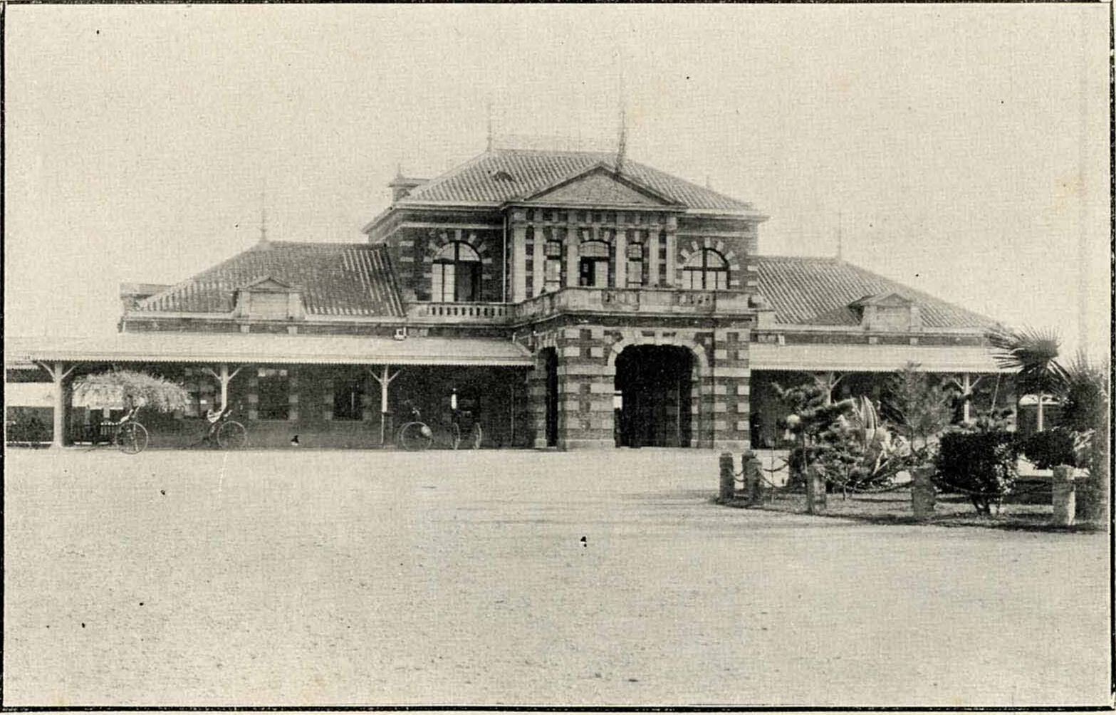 中文（台灣）: 日據初期的台北車站，本建築於1939年拆除。國家文化資料庫藏。